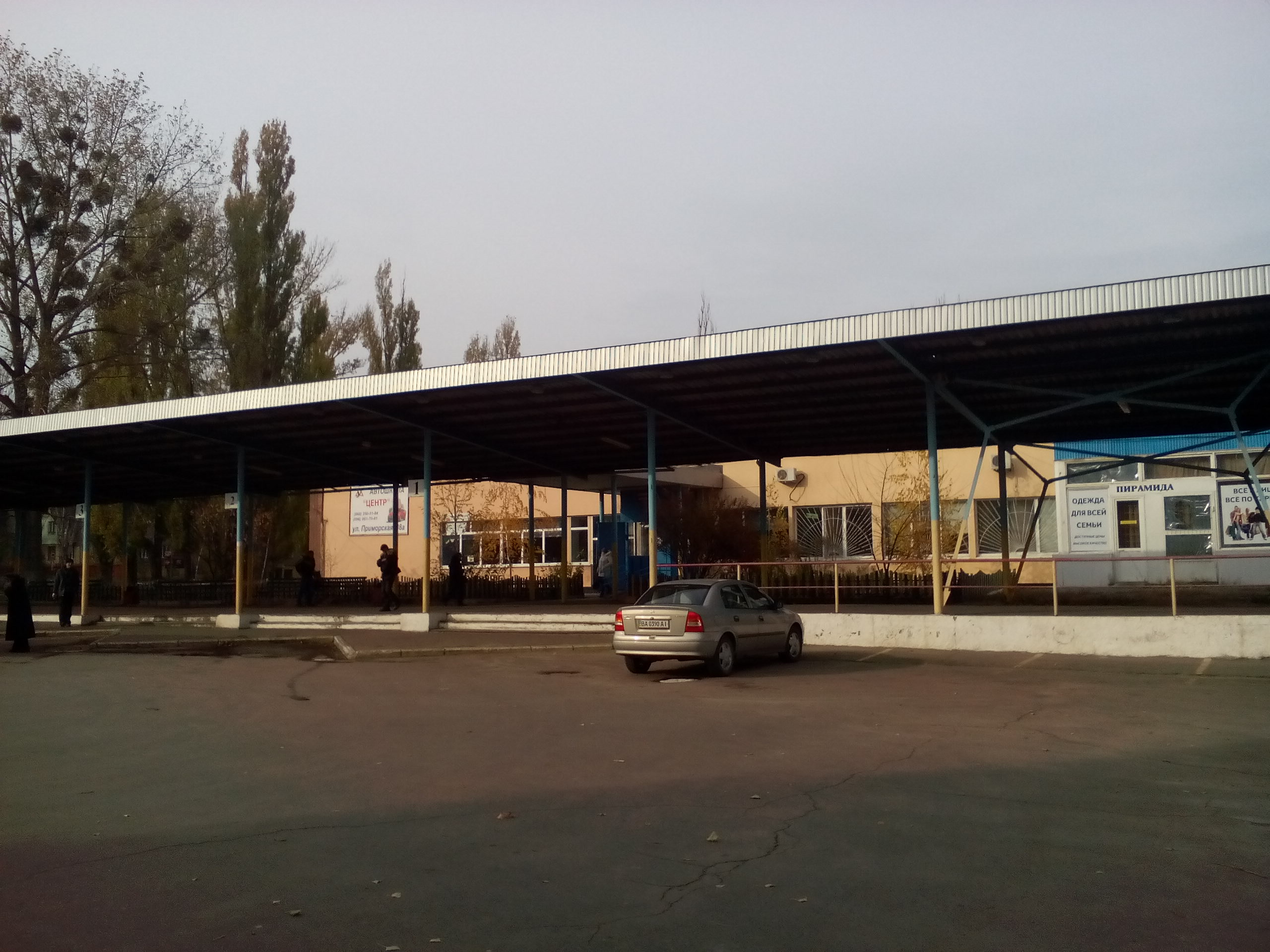 Автостанція у місті Світловодськ Кіровоградської області